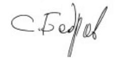 Автограф Сергея Бодрова-младшего